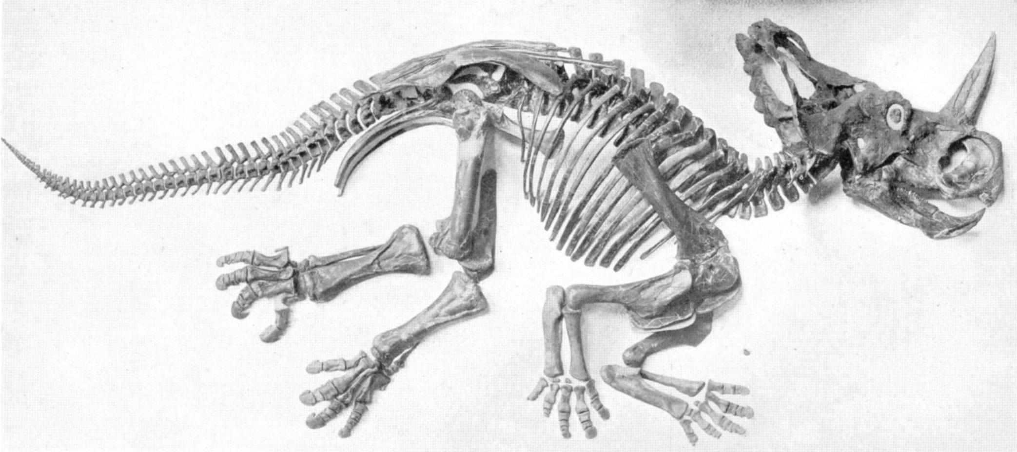 Monoclonius nasicornis skeleton.[1]